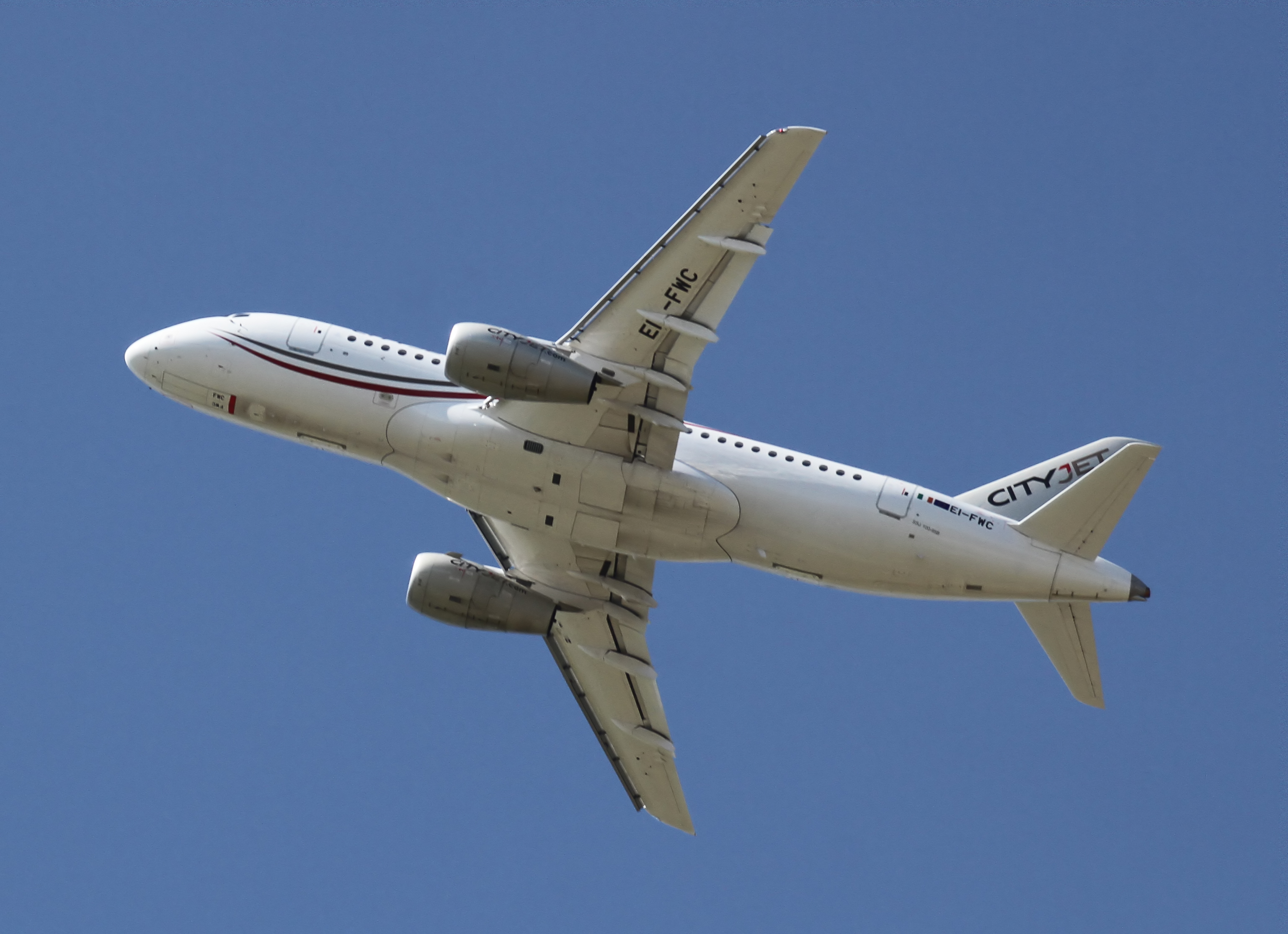 EI-FWC Cityjet Sukhoi Superjet 100-95B